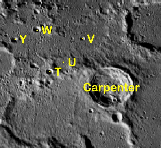 Cráter lunar Carpenter. Cráteres satélite. (Imagen LRO)